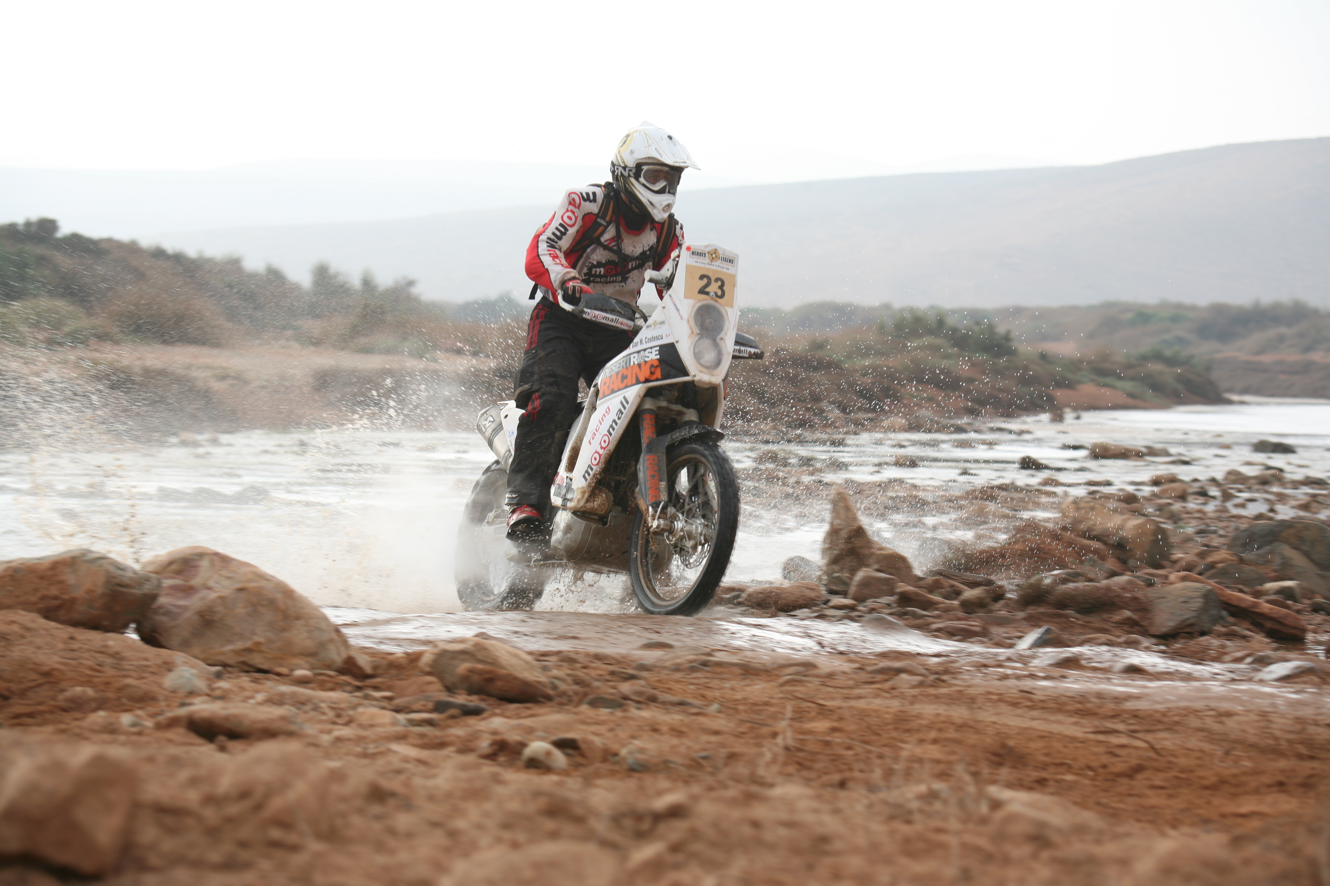 Traversare Oued inundat ]n Maroc